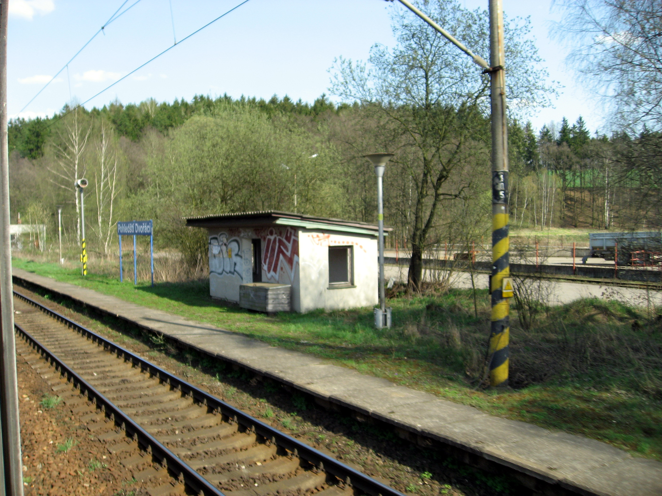 Pohledští Dvořáci, železniční stanice